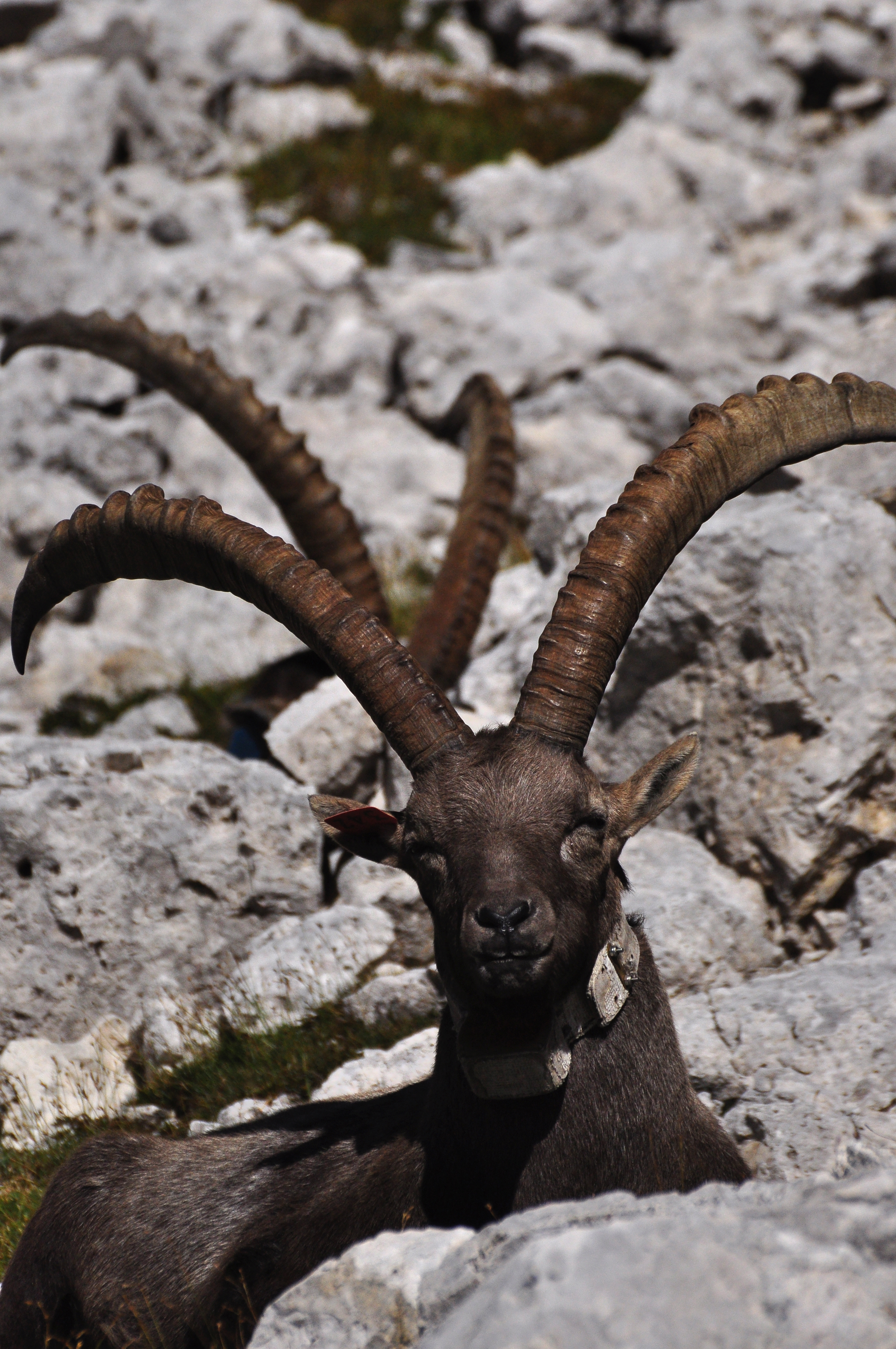 Stambecchi